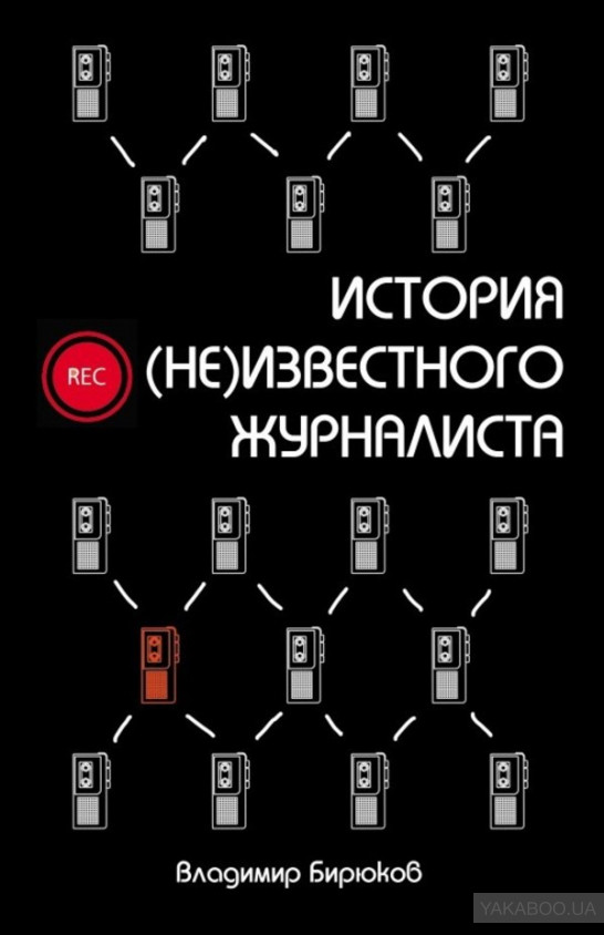 Книга История (не)известного журналиста. Автор В. Бирюков